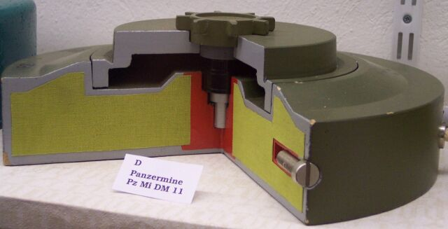 Panzermine (DM 11 AT) aufgeschnitten